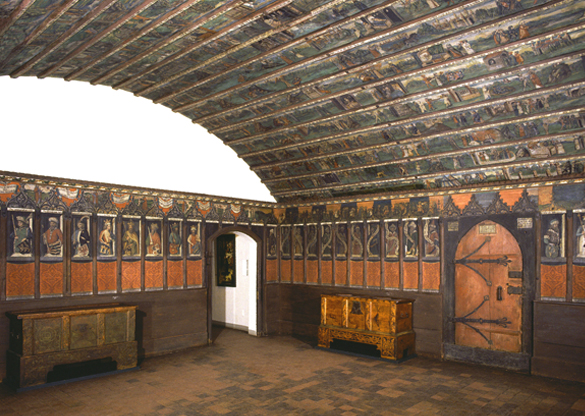 Decken- und Wandvertäfelung des ehemaligen Zunfthauses der Weber zu Augsburg